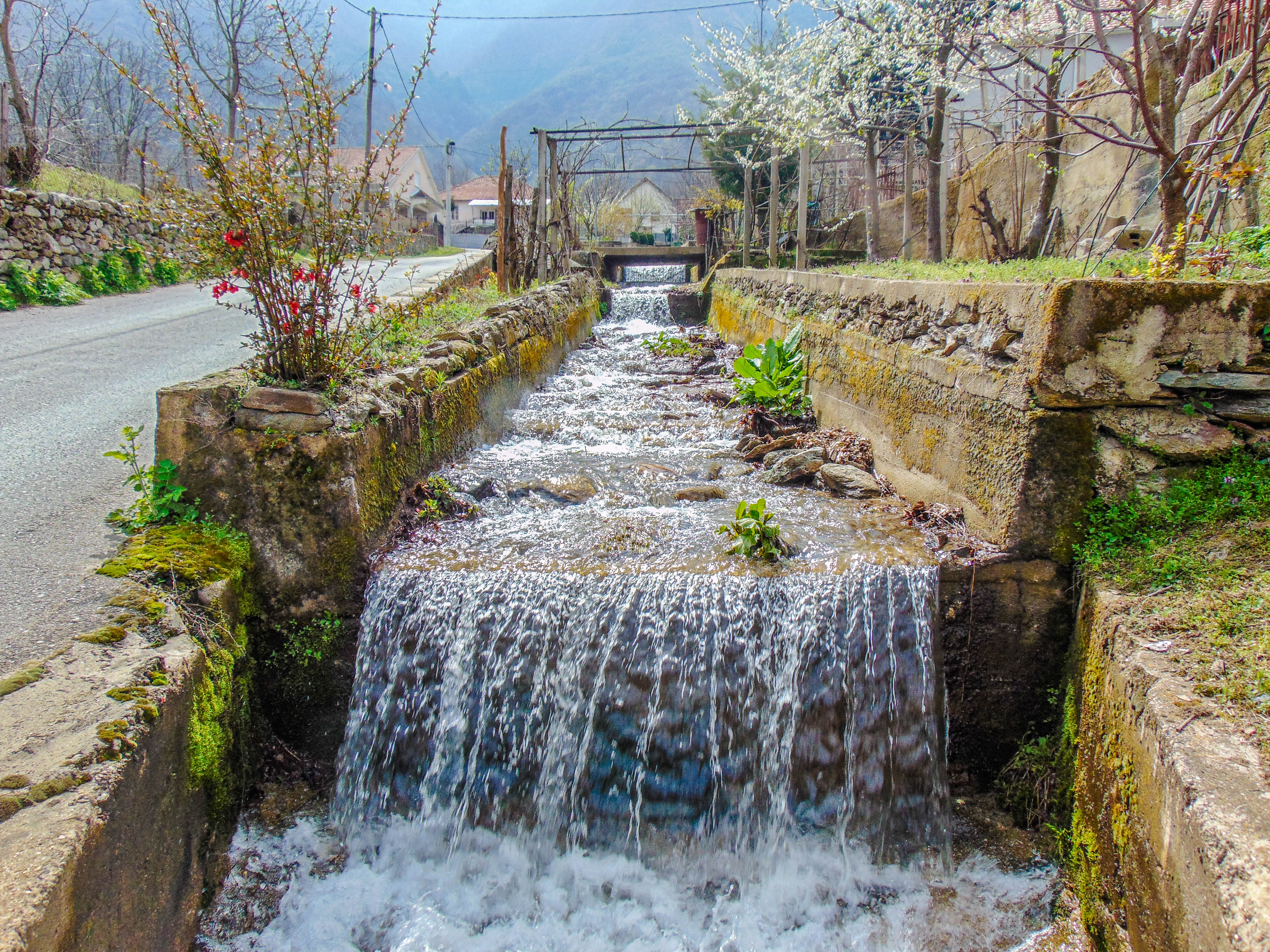 Реката Стар Дол во Старо Коњарево, Општина Ново Село, Струмичко.